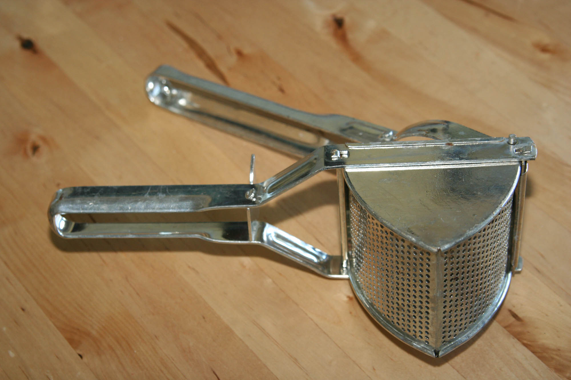 Potatispress för pressning av kokt potatis